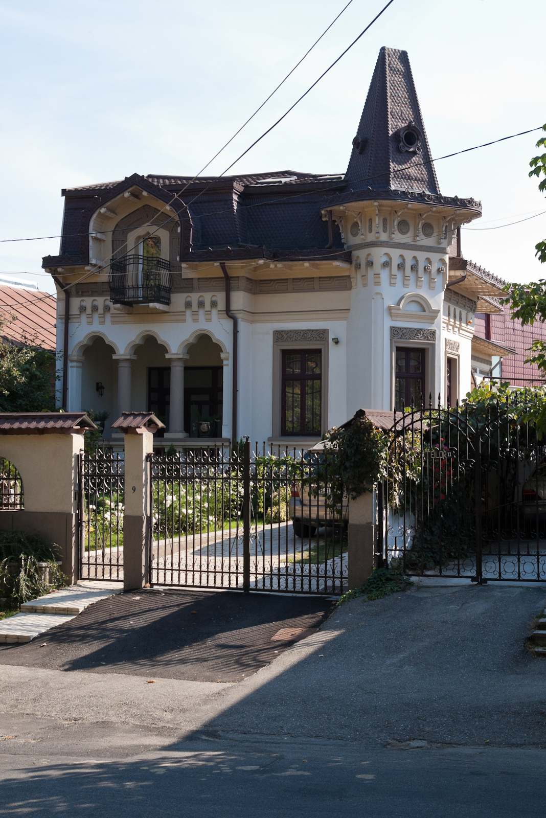 Fotografia prezinta casa Ovidiu Constantinescu de pe str. Teilor 9.